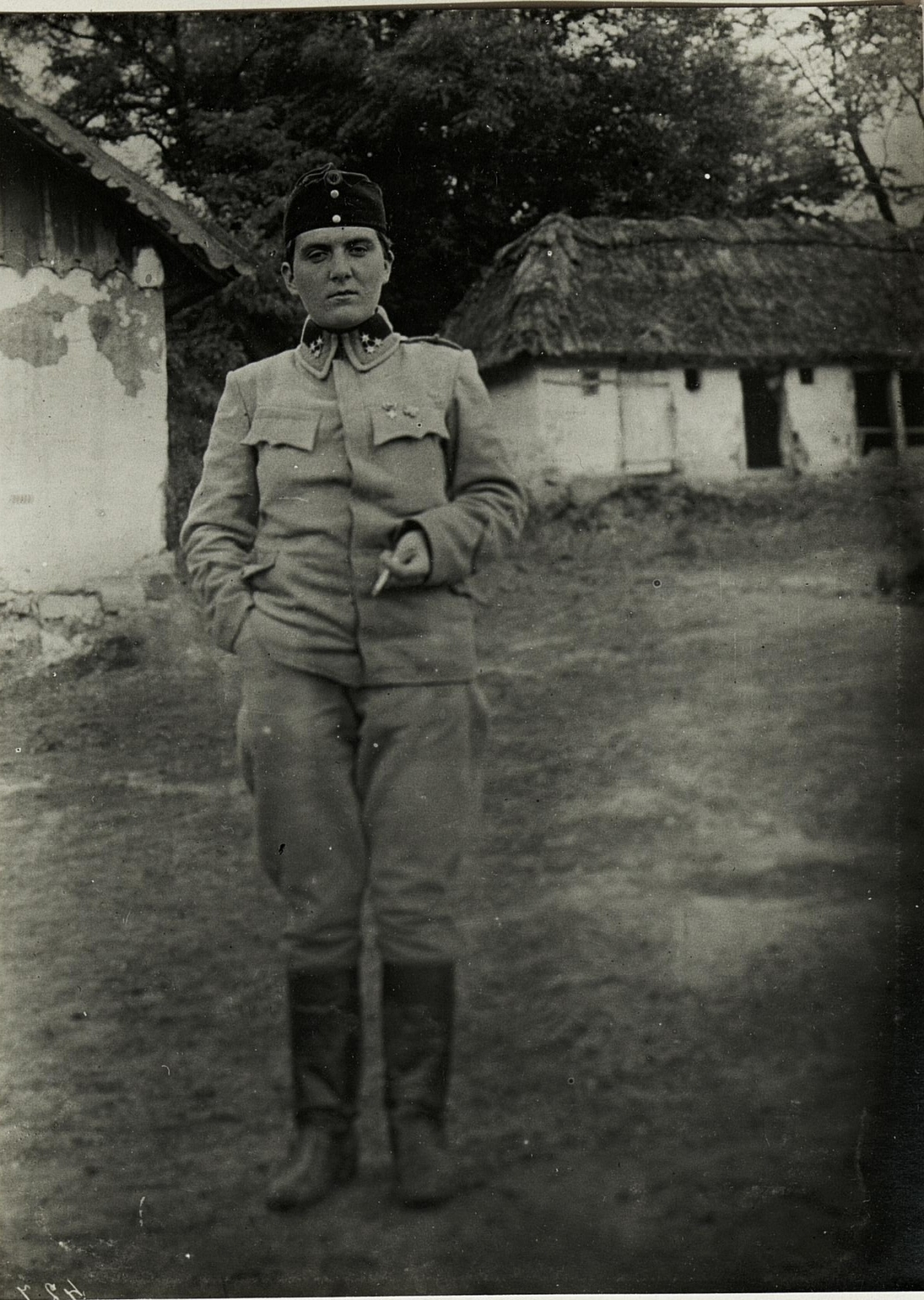 Eine heldenmütige Ukrainerin.Frl.Jarema Kuz der ukr.Legion beim Korps FML.Hofmann.